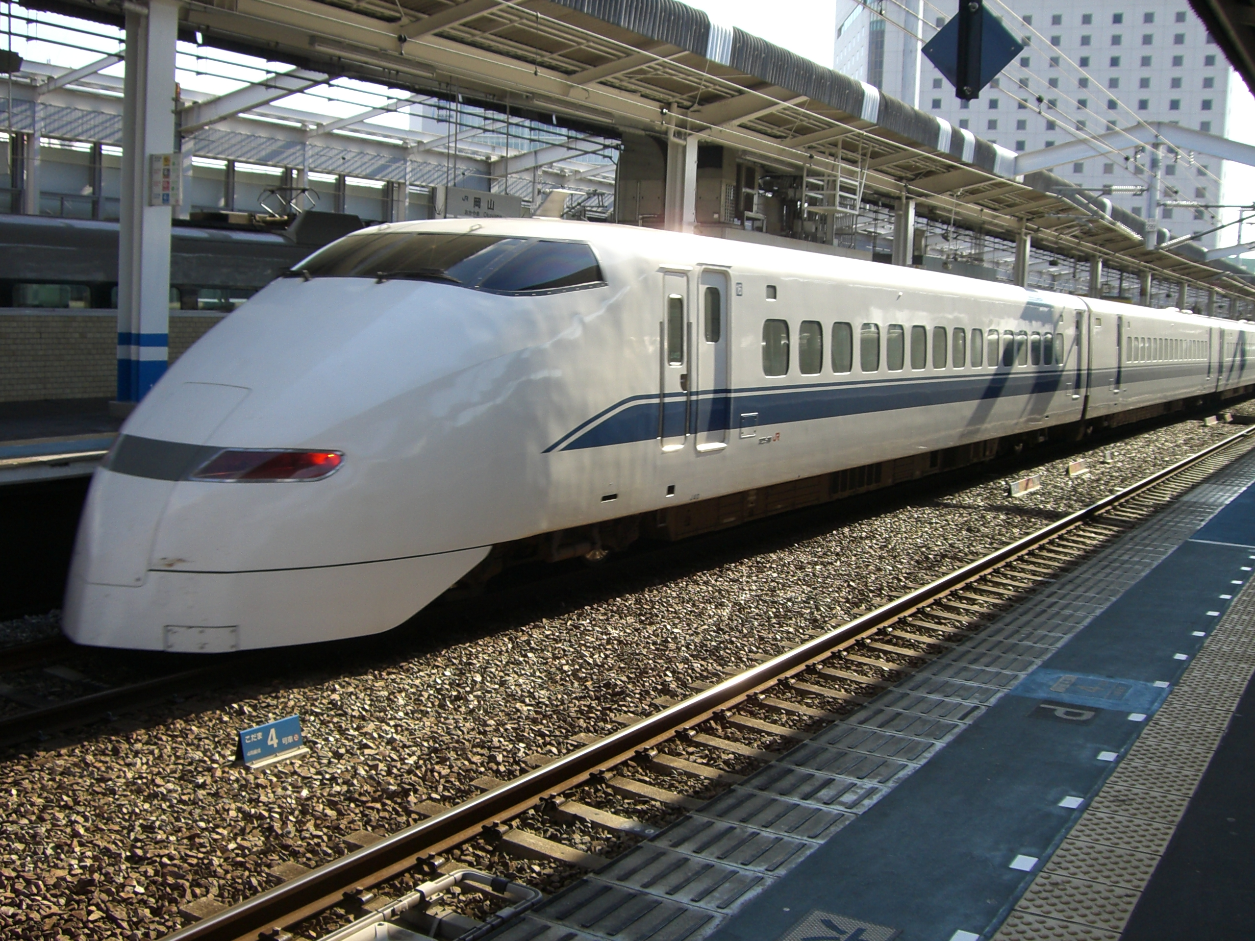 Shinkansen Series 300 in Okayama Station